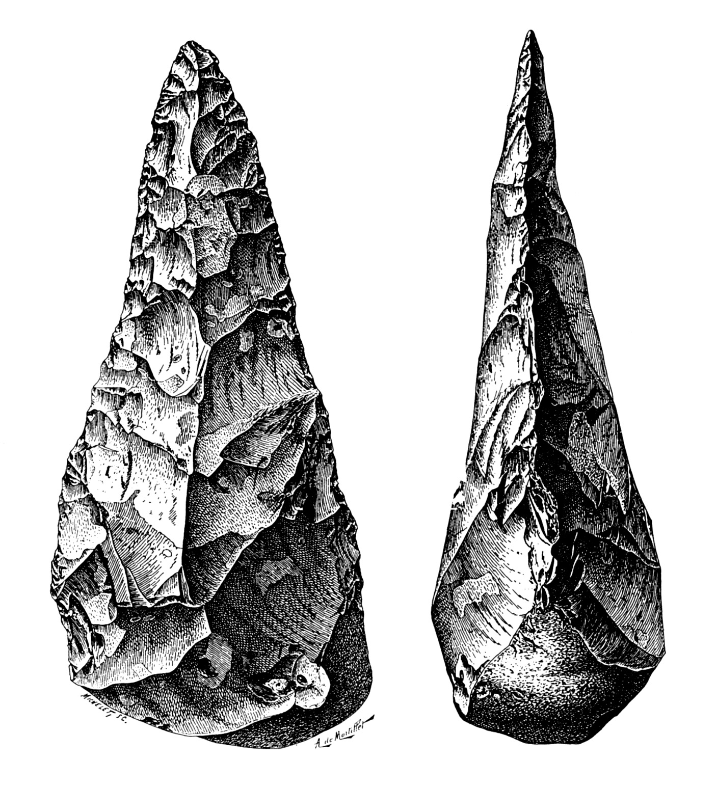 dessin de biface en silex de Saint-Acheul (Somme, France) - 20 cm de haut - dessin de A. de Mortillet (fin XIXème)